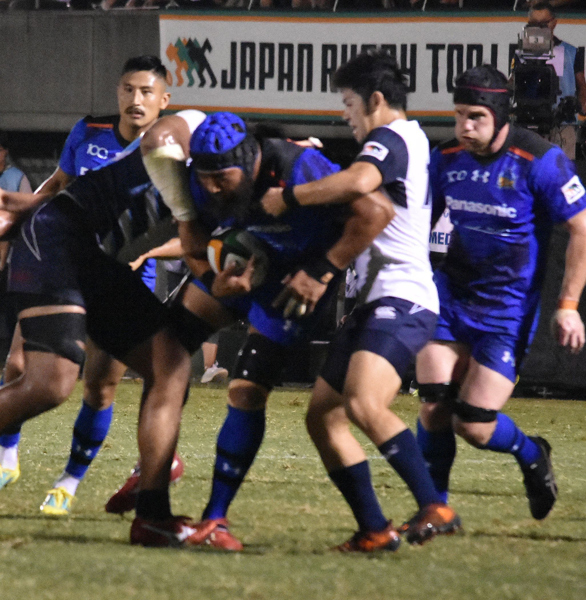 ホラニ龍コリニアシ